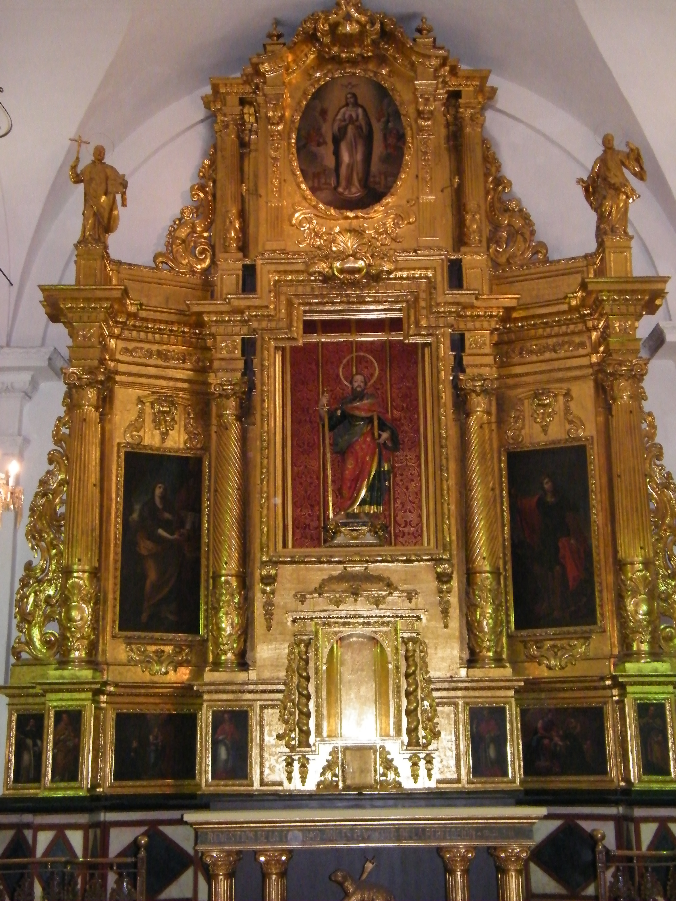 Retablo de la Capilla del Instituto de Enseñanza Secundaria Luis Vives de Valencia, con la representación escultórica de San Pablo como figura central.